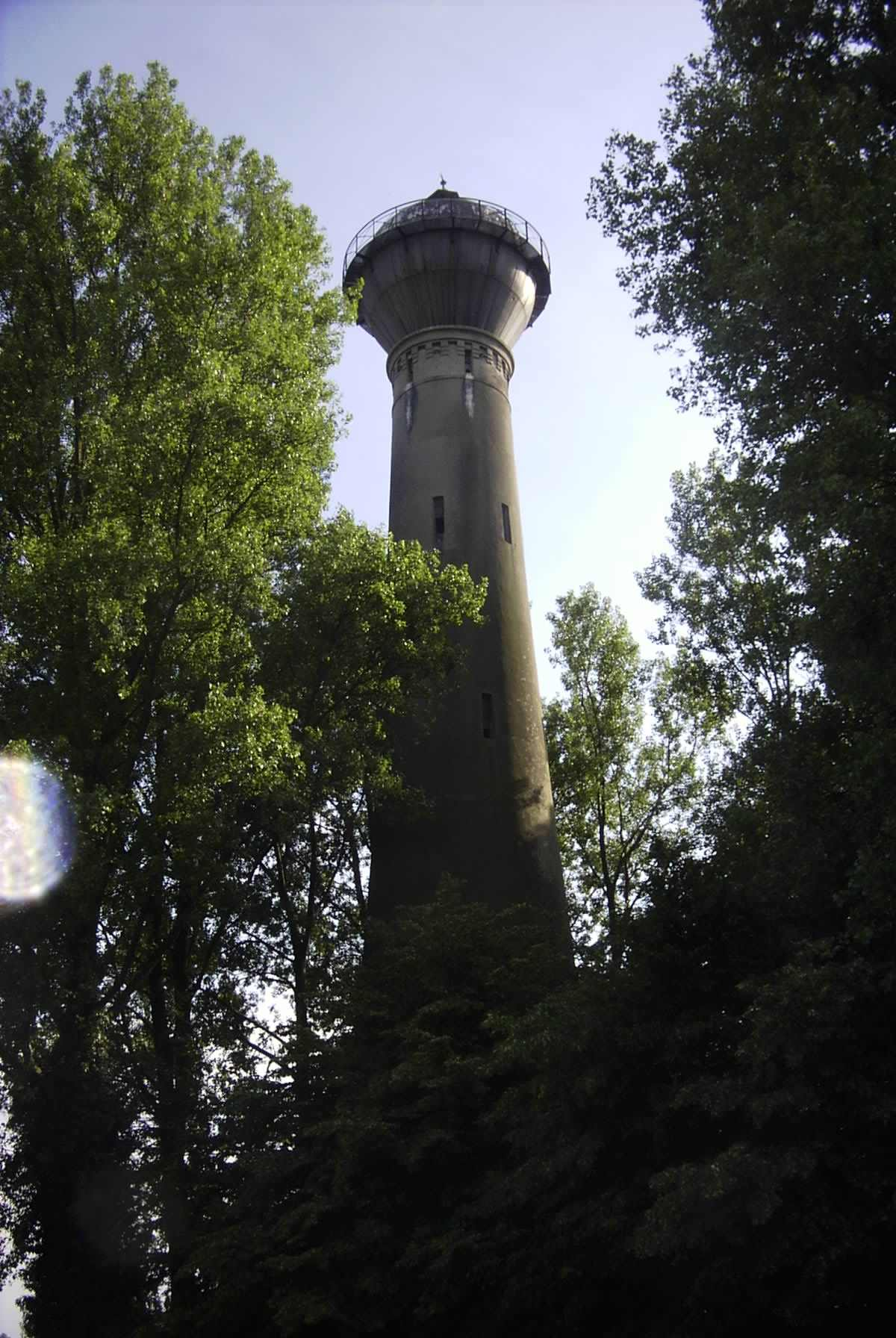 Summary Bildbeschreibung: Wasserturm des Wasserwerks Grevenbroich in Jüchen-Holz Quelle: eigenes Foto Fotograf/Zeichner: bodoklecksel 19:58, 25. Jun 2006 (CEST) Datum: Juni 2006 Sonstiges: ...